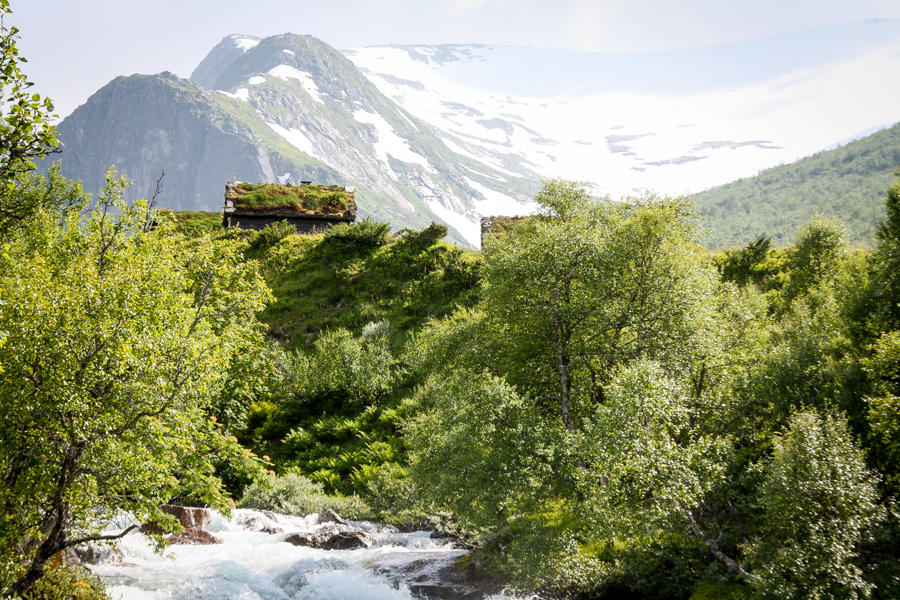 Befringselva i Befringsdalen i Jølster